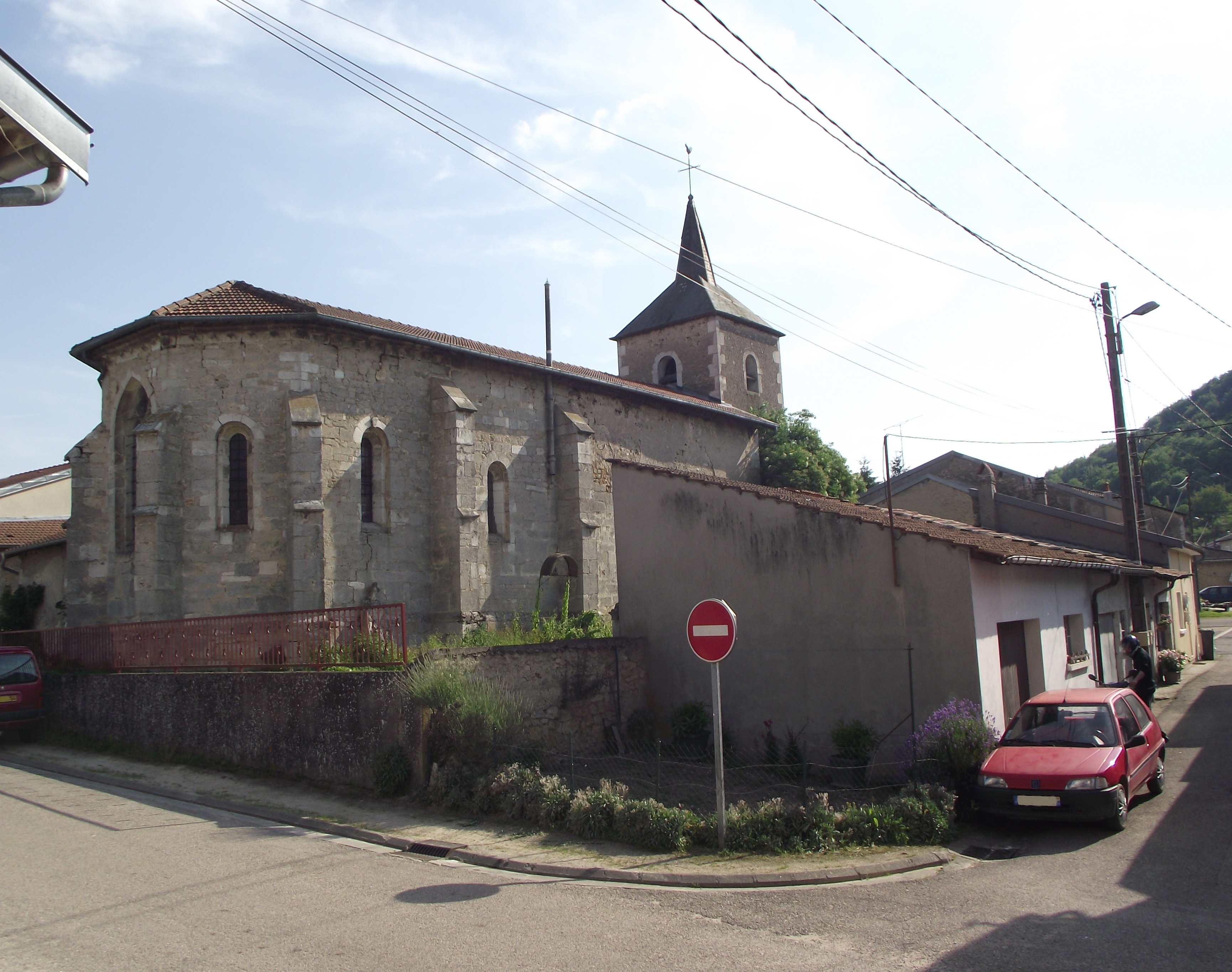 Eglise de Ménillot